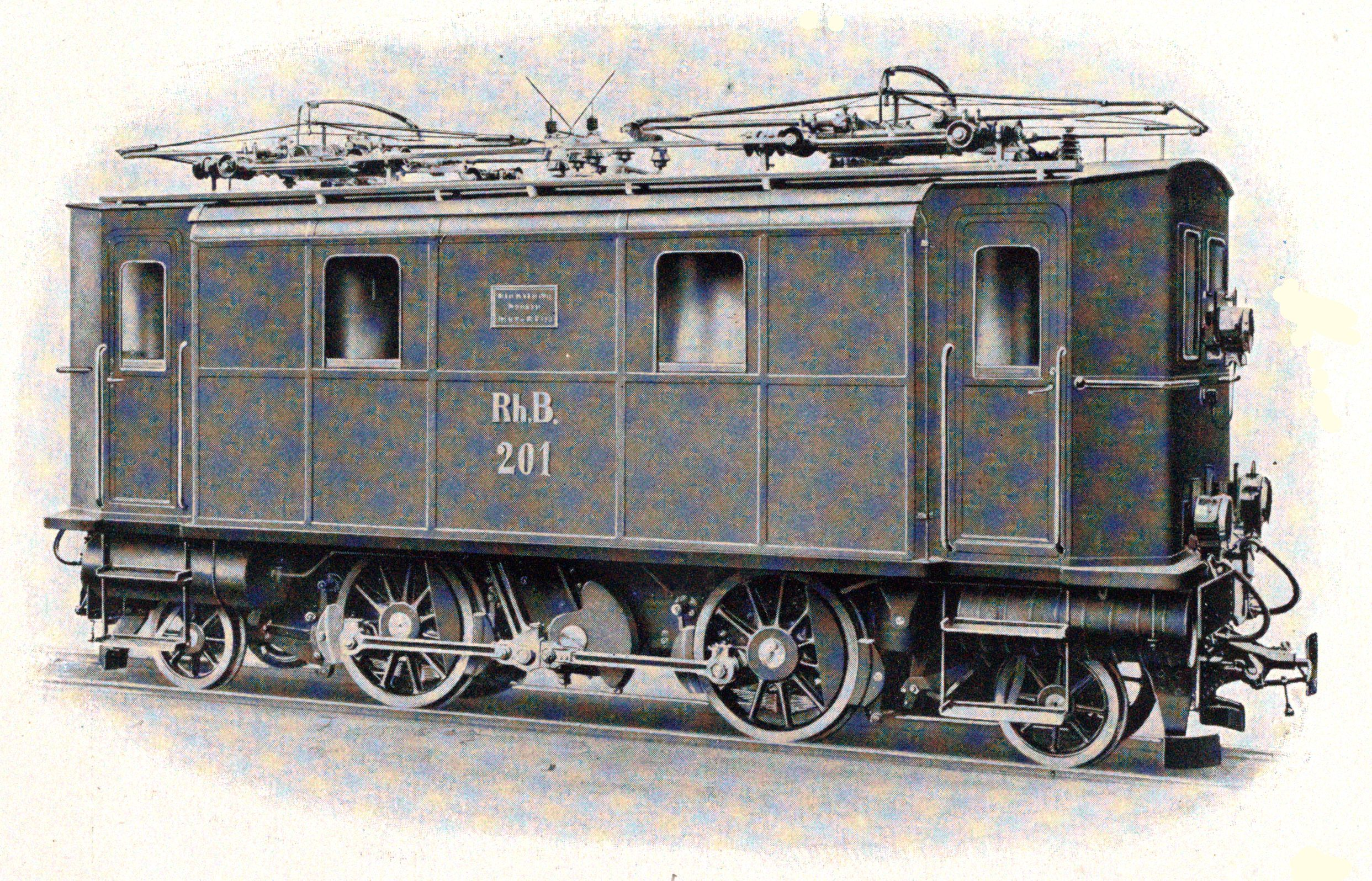 Rhaetian Railway Ge 2/4 1-B-1 Einphasen-Wechselstrom-Lokomotive für die Rhätische Bahn